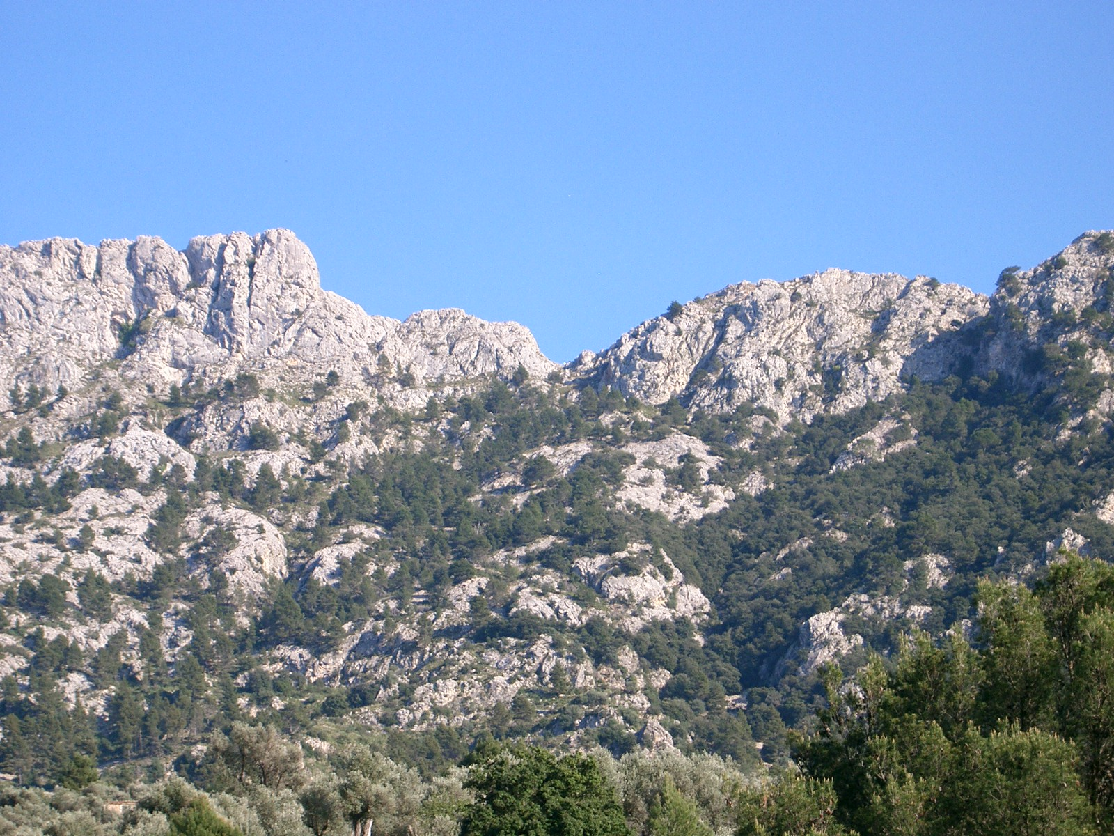 Es Portell de Sa Costa (Fornalutx). Mallorca